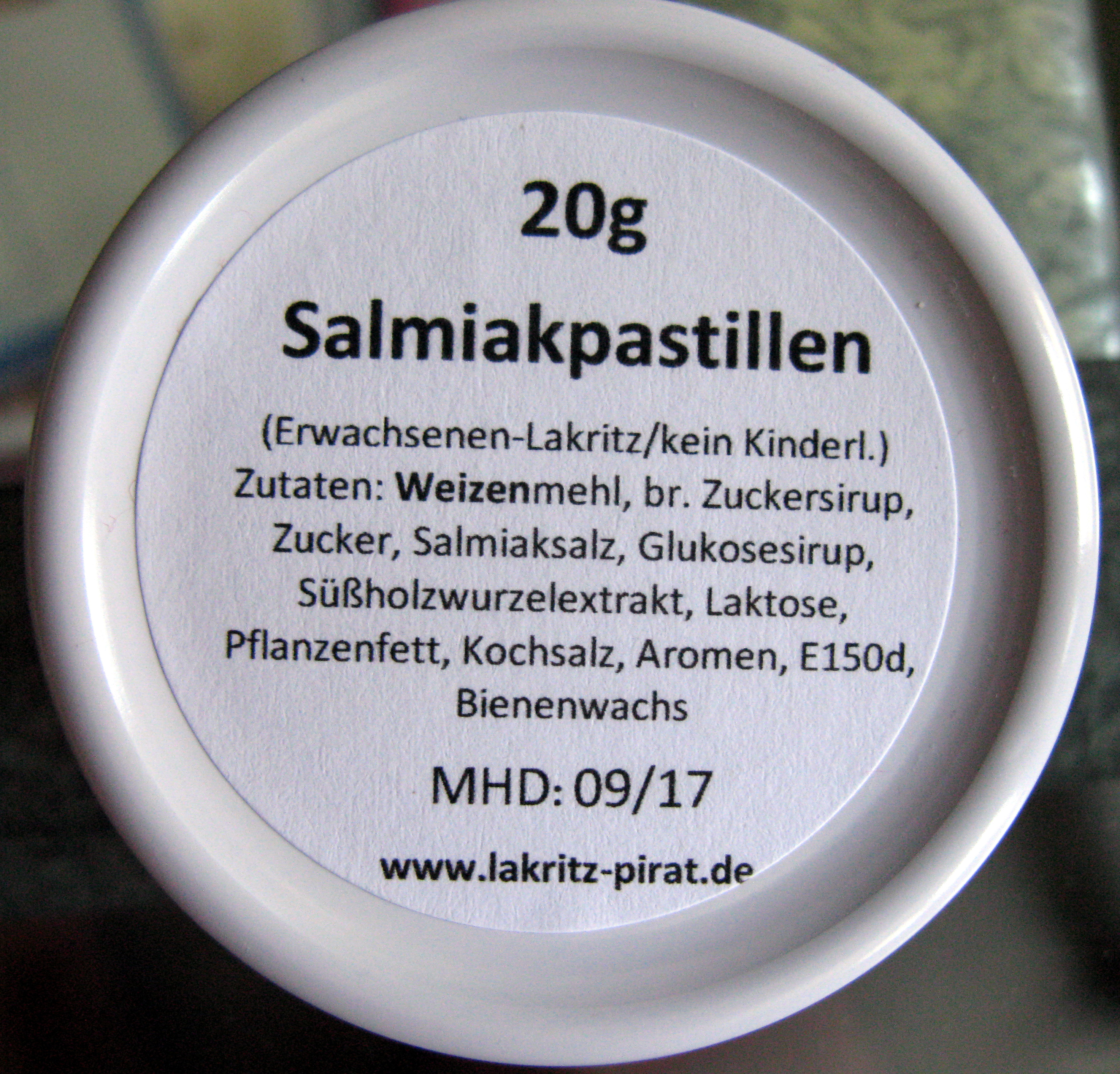 Salmiakpastillen, Zutaten und Warnhinweis